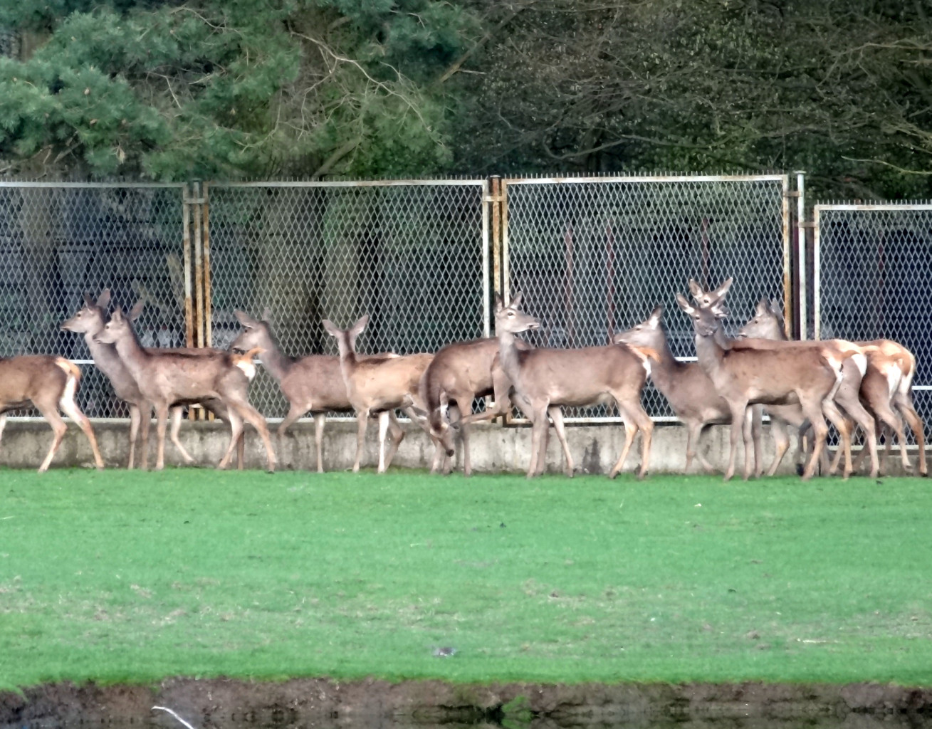 Wybieg dla saren w zoo w Myślęcinku (Bydgoszczy)